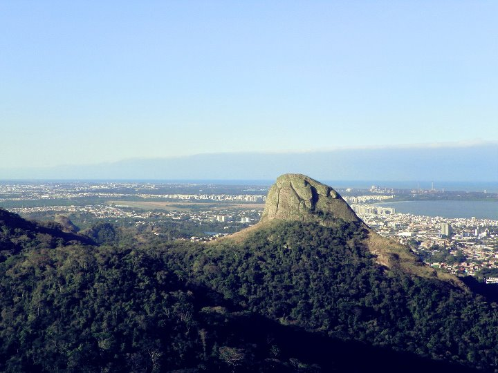 Vista da Pedra dos Dois Olhos